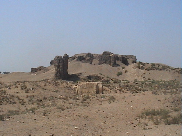 Vue d'ensemble de l'enceinte nord de Memphis avec les ruines du palais d'Apriès - XXVIe dynastie - Mit Rahineh